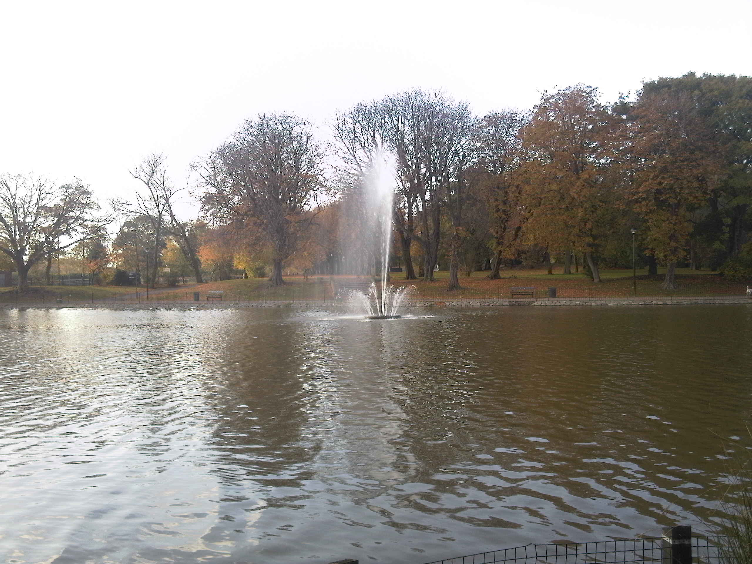 Lake in Albert park